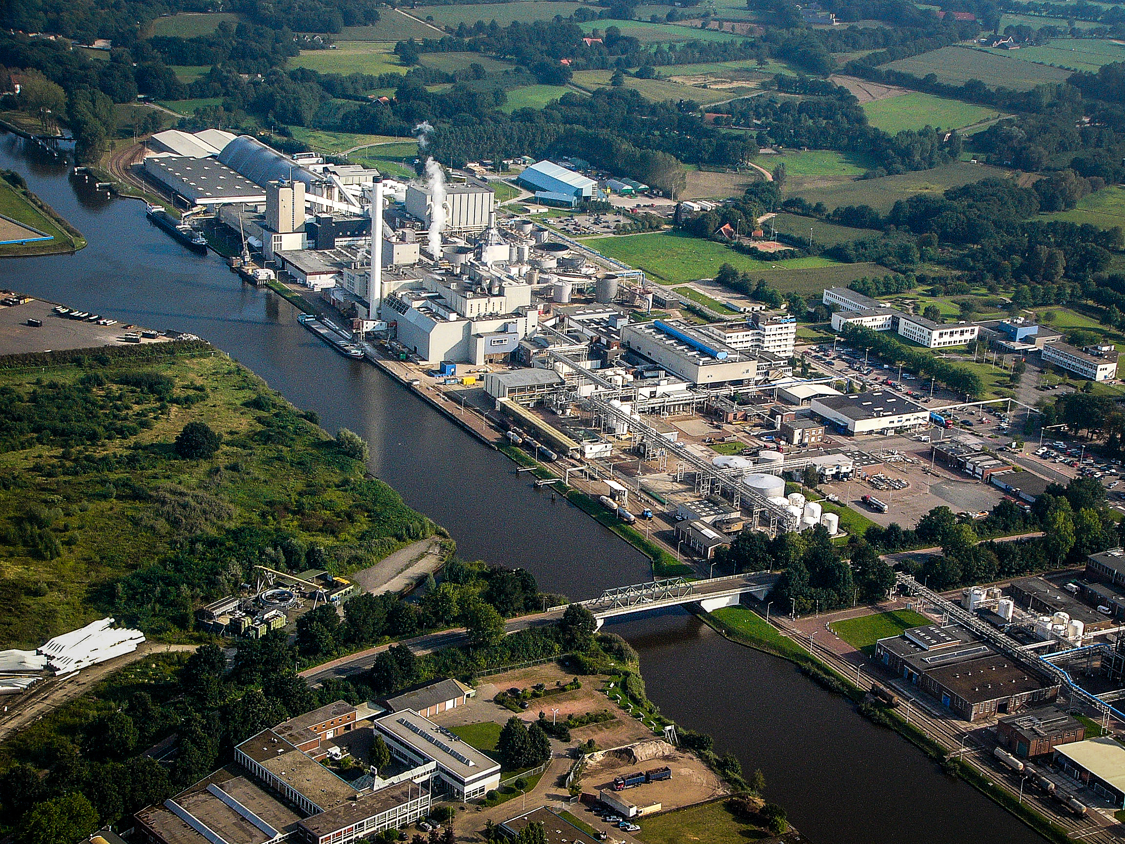 AKZO Hengelo aan het Twentekanaal